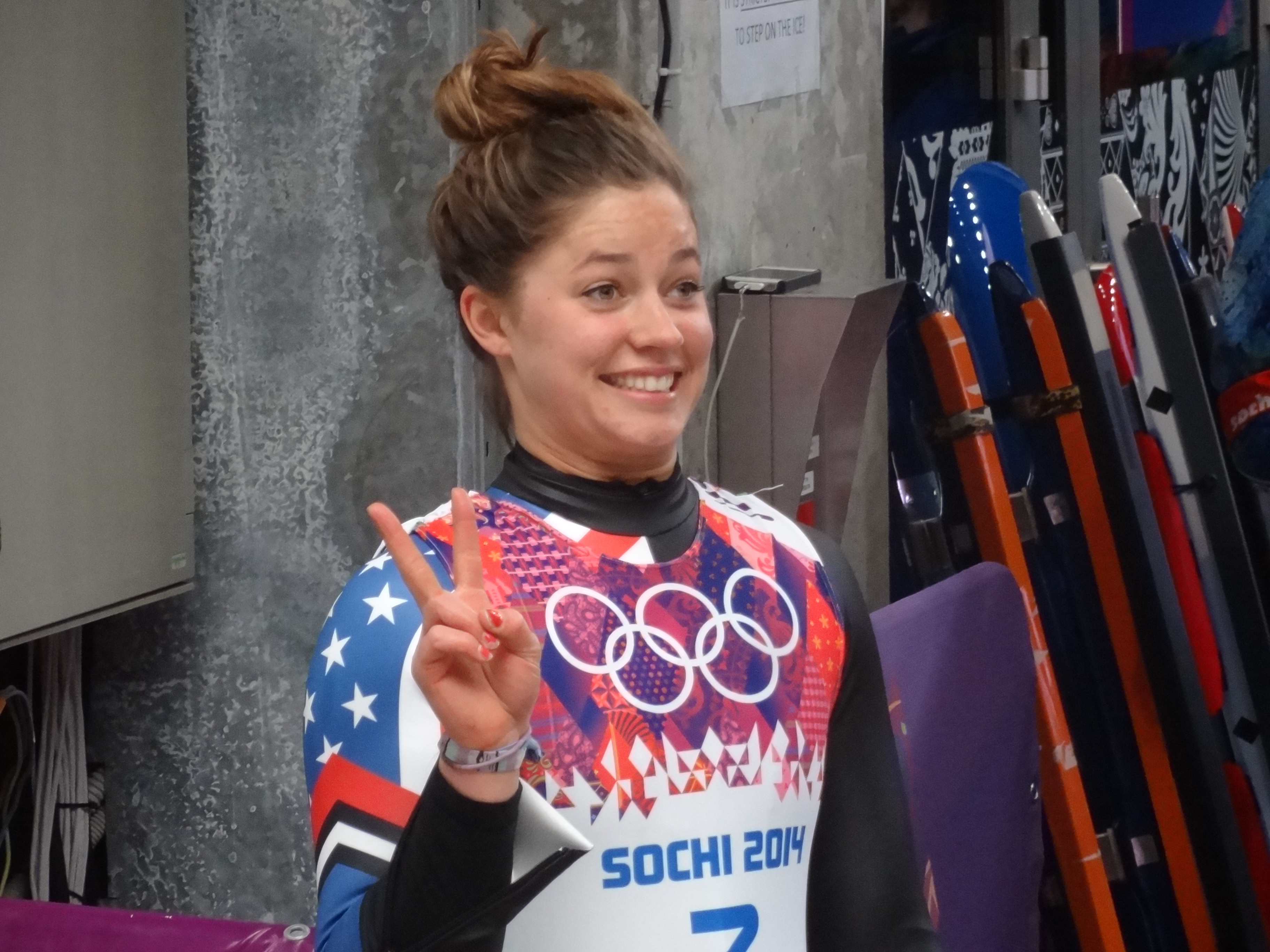 Олимпийские игры 2014 года в Сочи